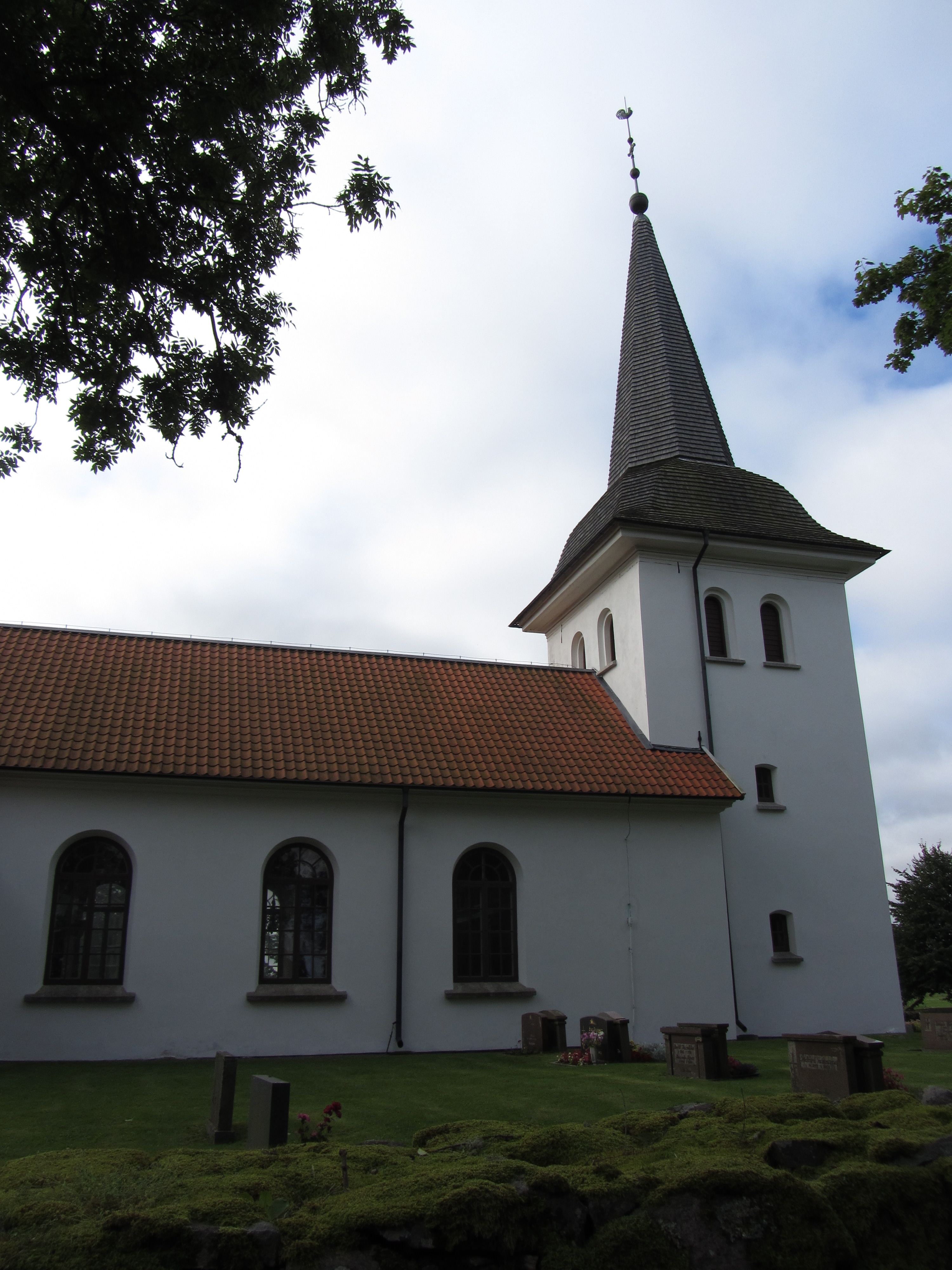 Berga kyrka i Västergötland, öster om Mariestad.